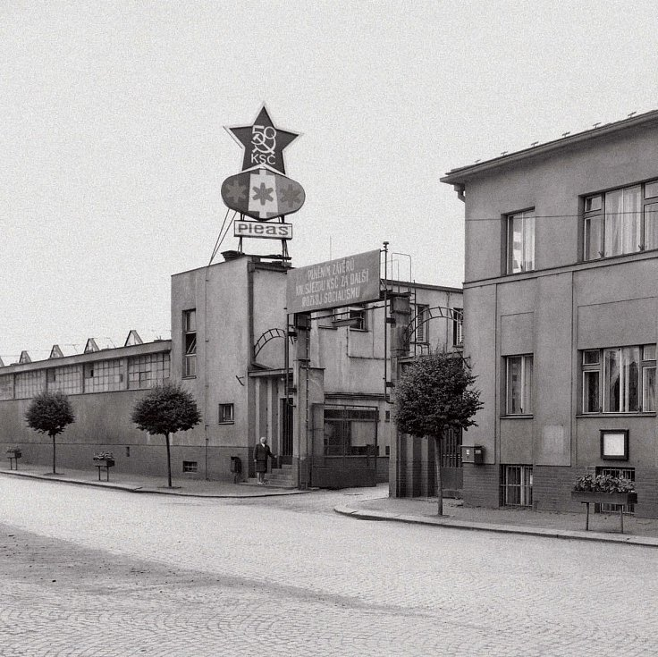 Historická vrátnice areálu firmy Pleas v Havlíčkově Brodě. Dle výzdoby oslavující 50. výročí založení KSČ (roku 1921) byl snímek pořízen pravděpodobně v roce 1971.